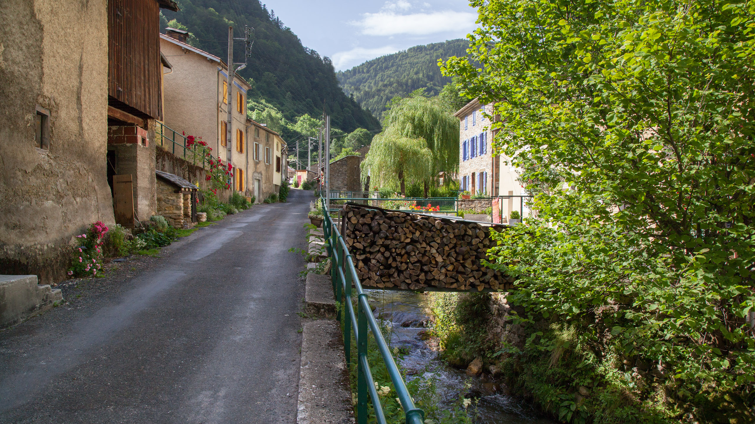 Rue principale